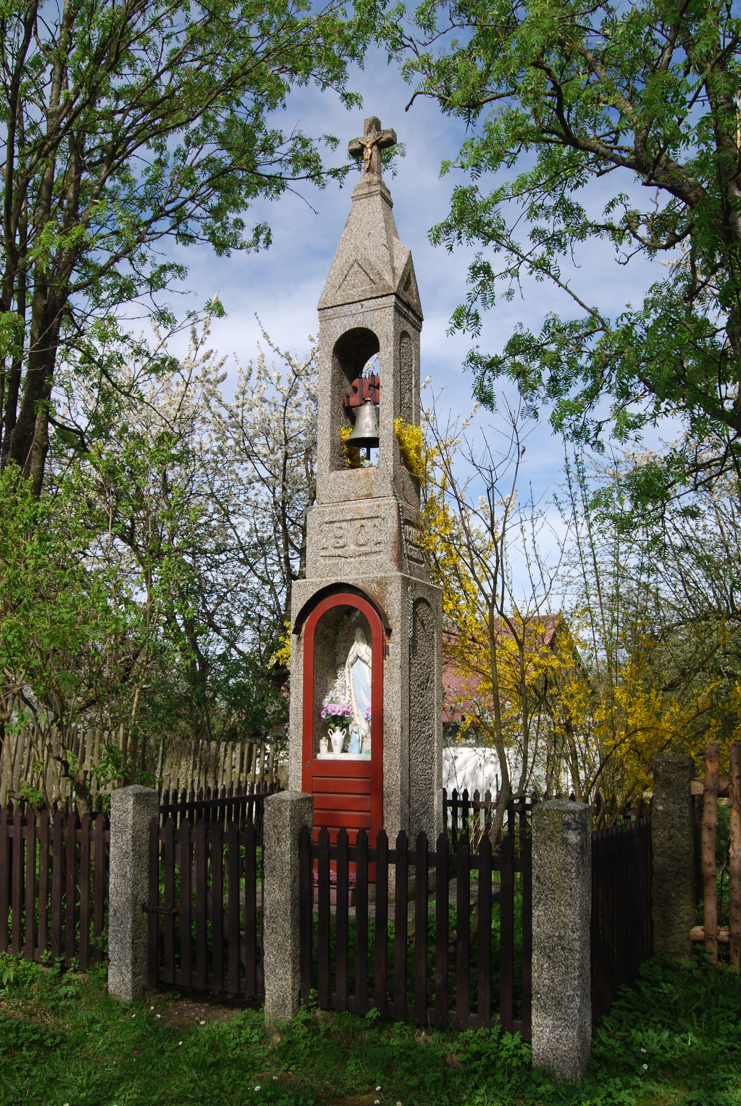 Kamenná zvonice v obci. Ounuz je malá vesnice, část obce Jistebnice v okrese Tábor. Česká republika.